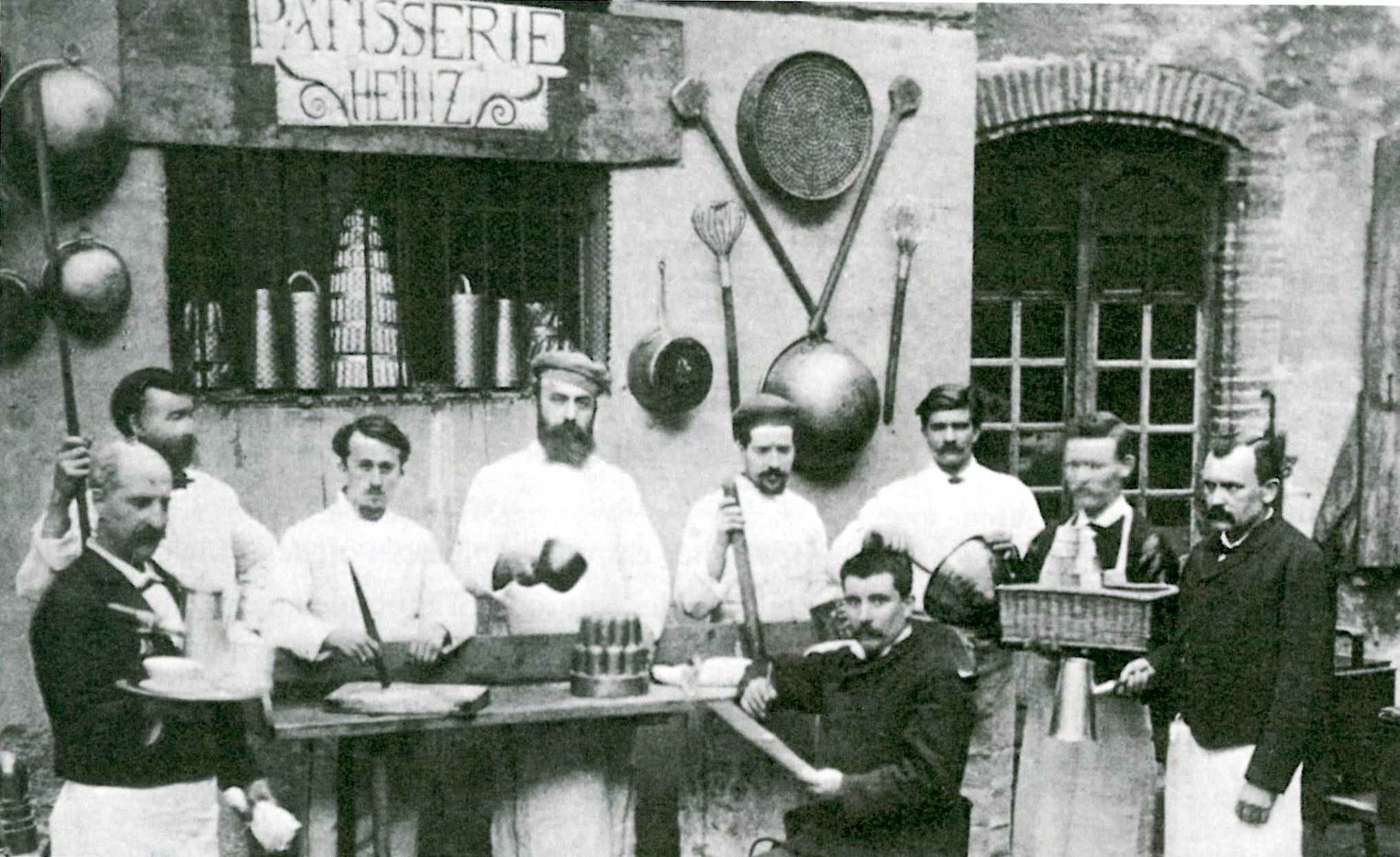 Belegschaft der Zuckerbäckerei Heinz&Tester in Toulouse um 1885, wo die Engadiner Nusstorte erstmalskommerziell hergestellt wurde